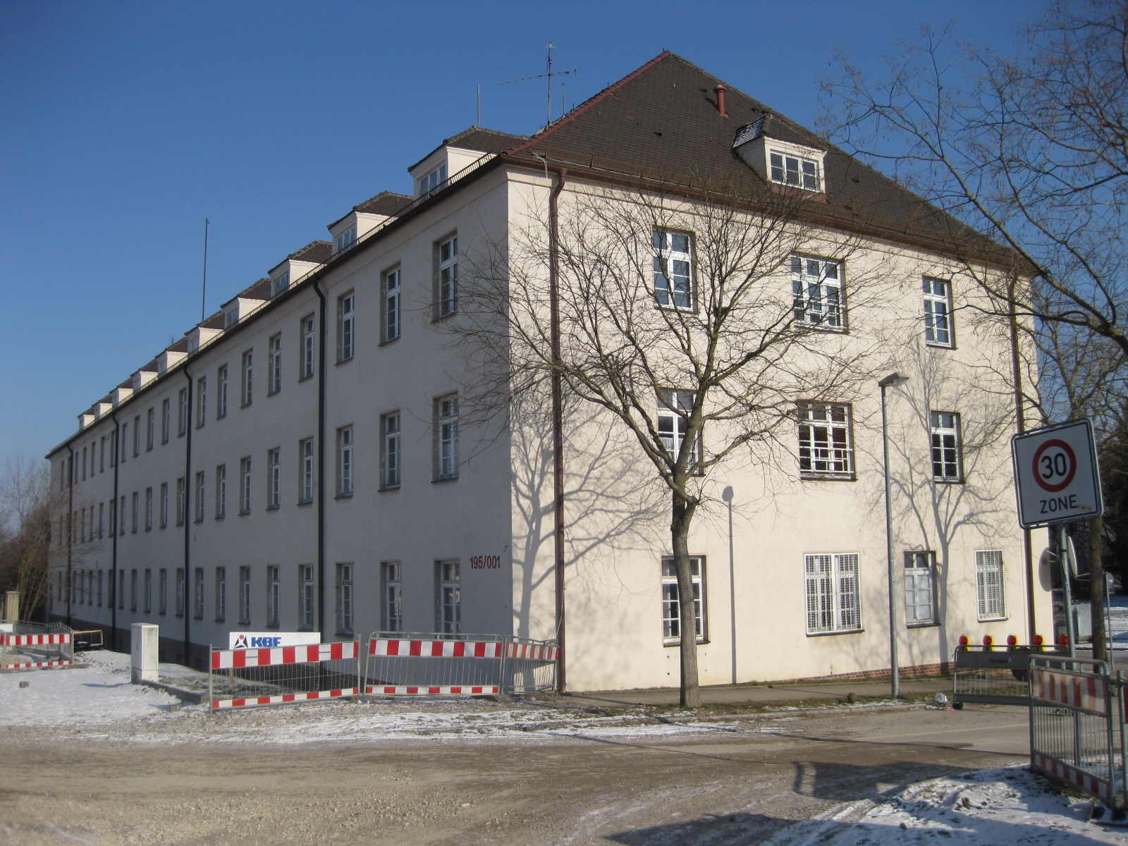 Ehem. Kasernengebäude, in dem z.T. Lehrveranstaltungen der EFHS Reutlingen stattfanden